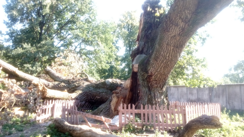 Ленінскі (Ацячызна). Ацячызненскі дуб-волат